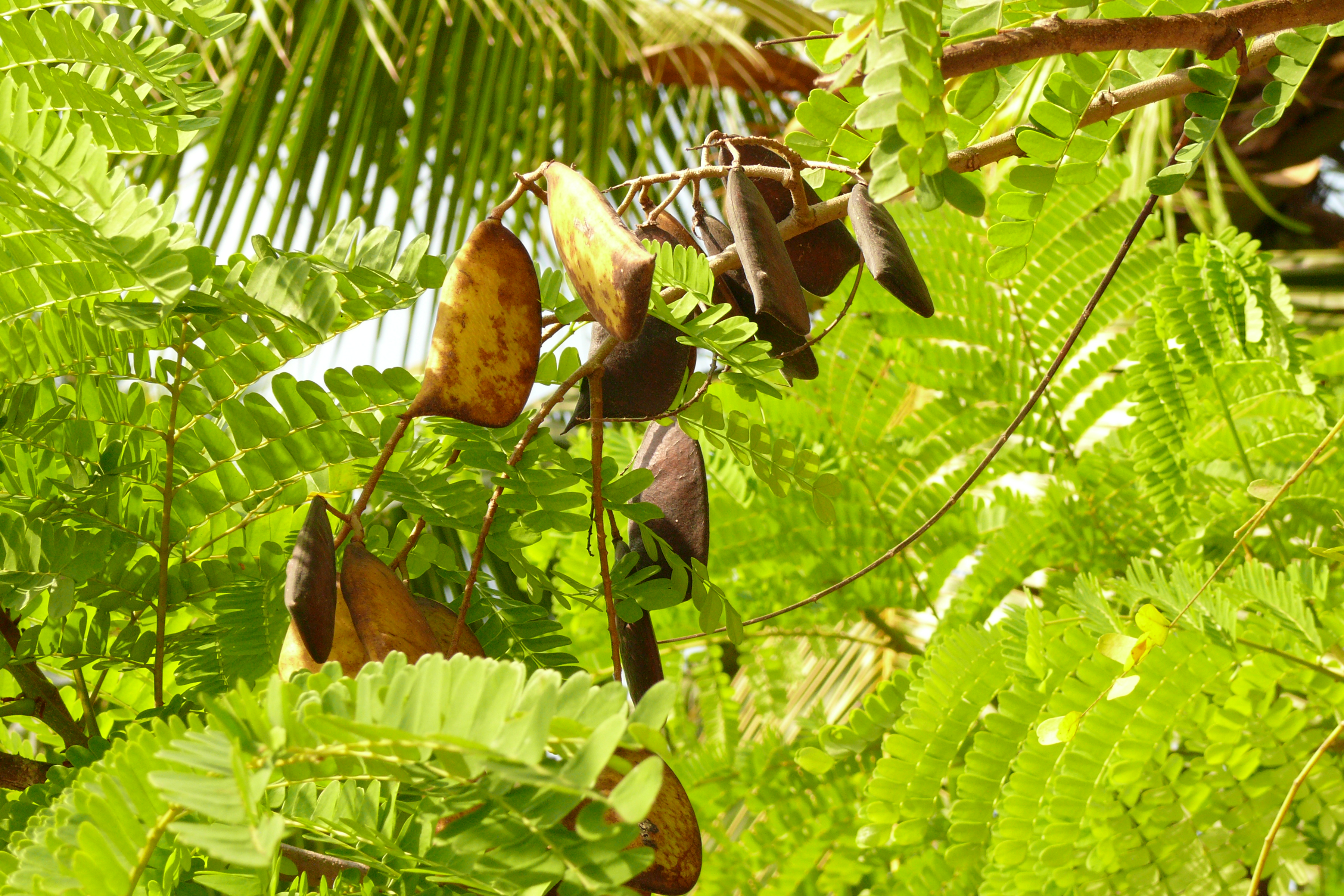 Biancaea sappan